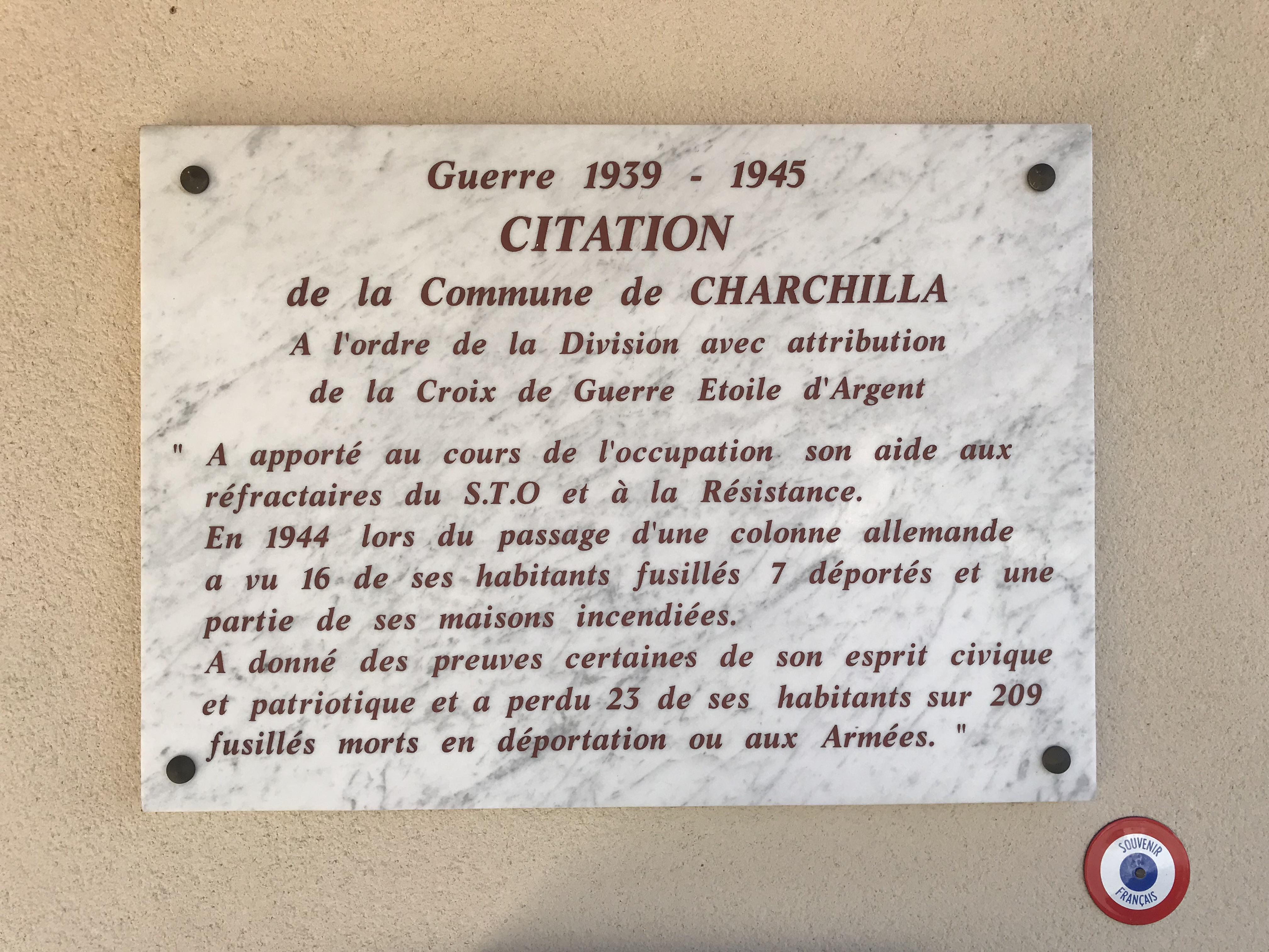 Mairie de Charchilla.